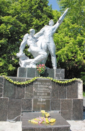 Монумент 200-м воїнам-новопільцям, які загтнули під час Німецько-радянської війни